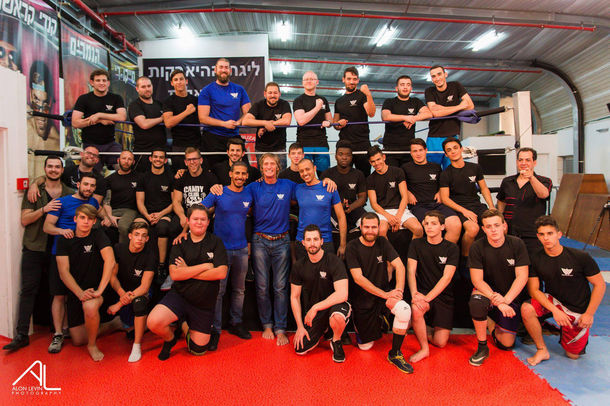 תלמידי האקדמיה ביחד עם רוסטר המתאבקים ועם קווין ואן אריק (צילום: אלון לוין)